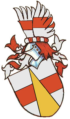 Official arms of house Kobyla z Dvorce.